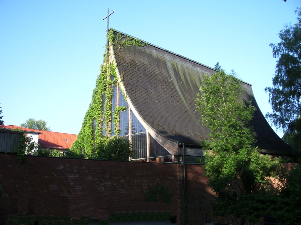 Erding Erloeserkirche